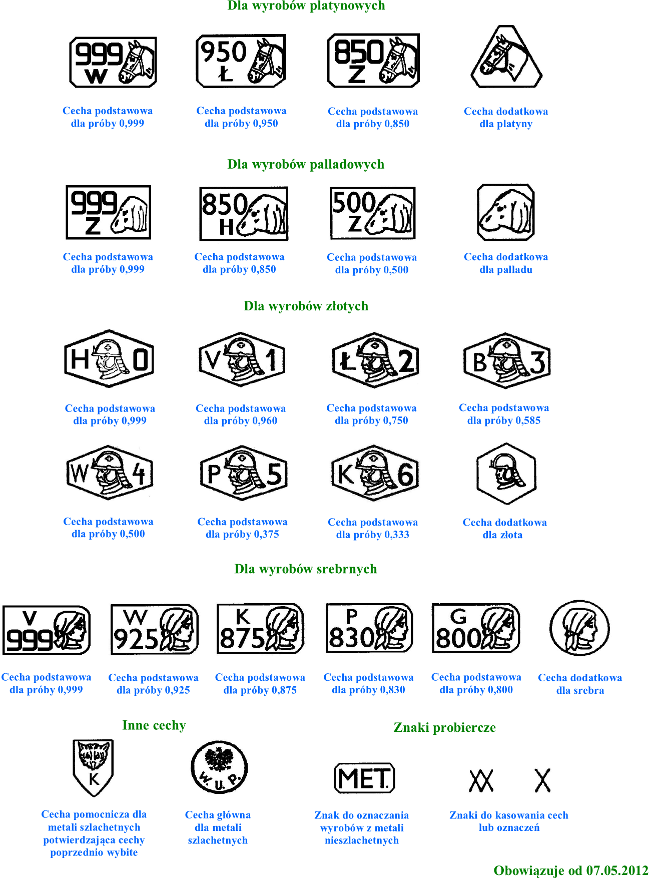 Ustawą z dn. 1 kwietnia 2011 r. Prawo probiercze wprowadzone zostały nowe próby dla metali szlachetnych i ich stopów obowiązujące na terenie RP: dla stopów platyny: 0,999 oraz 0,850 dla stopów palladu: 0,999 dla stopów złota: 0,999 dla stopów srebra: 0,999 Obowiązujące wizerunki nowych cech probierczych zostały umieszczone w Załączniku nr 1 do Rozporządzenia Ministra Gospodarki z dnia 31 maja 2012 r. w sprawie wyrobów z metali szlachetnych (Dz.U. z 2012r., poz. 681).